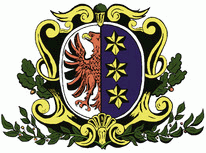 Poprzedni herb miasta Lipiany (woj. zachodniopomorskie) w pełnej oprawie